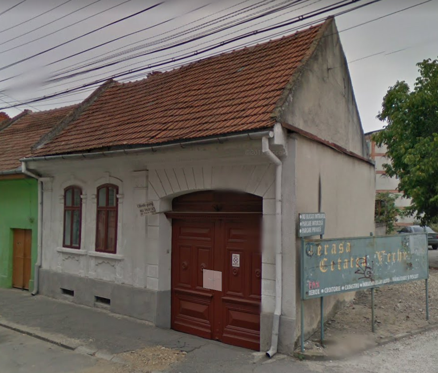 Casă, fost atelier de cizmar